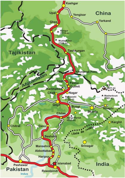 Mapa de ruta de la Carretera de Karakoram, modificáu a partir de Image:KKH.png (llicencia GFDL) por tar defectuosa la imaxe.